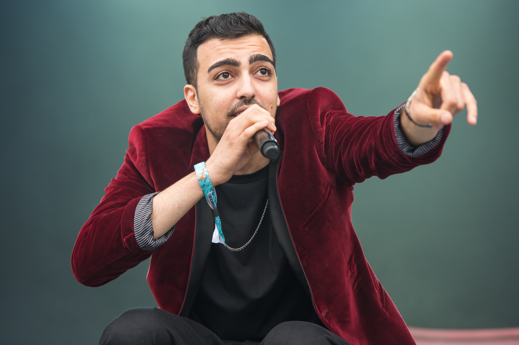 Andac Berkan Akbiyik,BRKN,Deichbrand,ESK Events & Promotion GmbH,Festival,Konzert,Livekonzert,Livemusik,Sea-Airport Cuxhaven/Nordholz,See-Flughafen Cuxhaven/Nordholz,Seeflughafen Cuxhaven/Nordholz,Water Stage